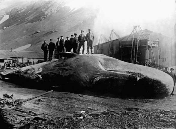 Verlopen auteursrecht ivm ouderdom afbeelding (1913). Aangepaste versie van afbeelding op zie hier voor de afbeelding zelf